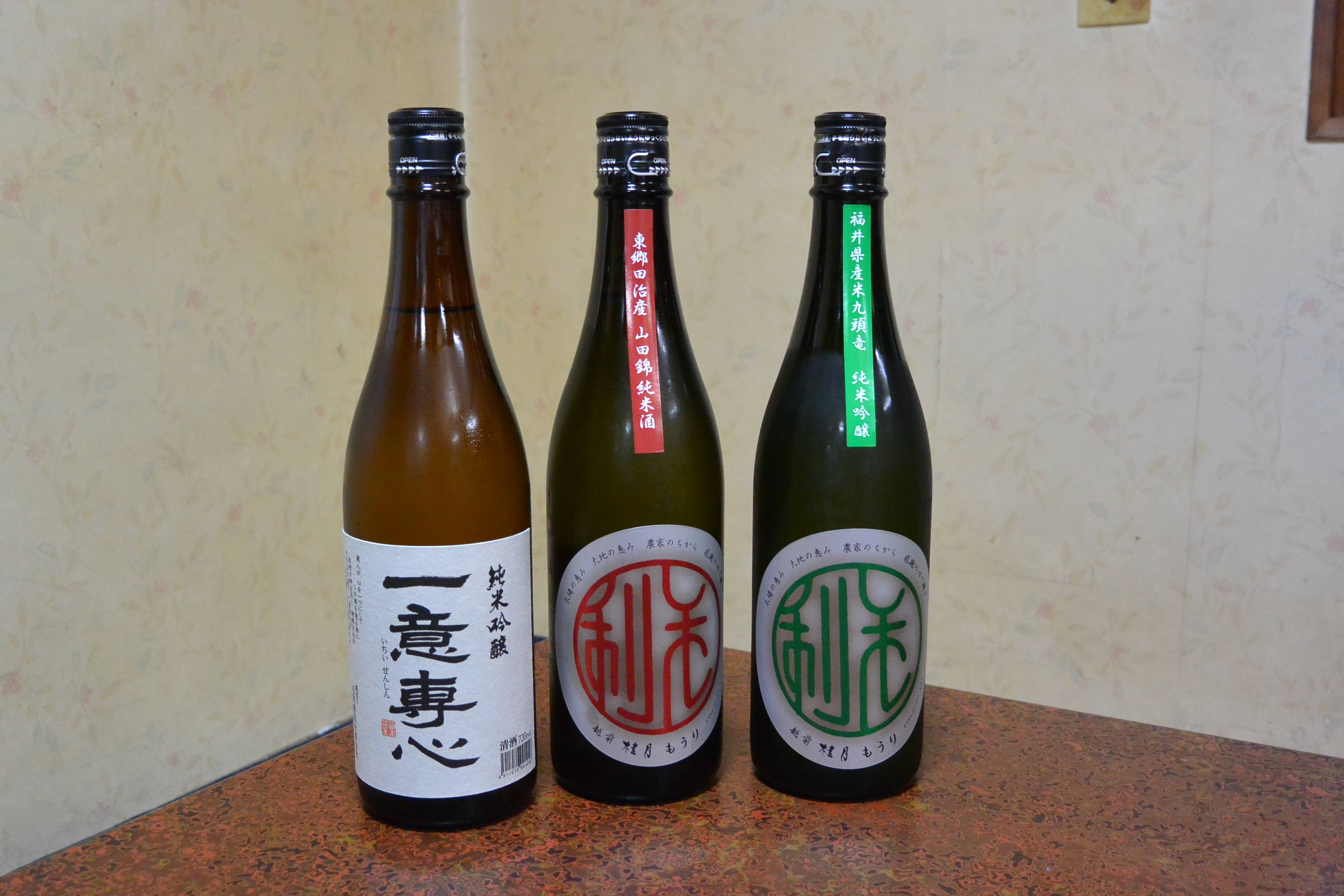 福井県の毛利酒造のボトル